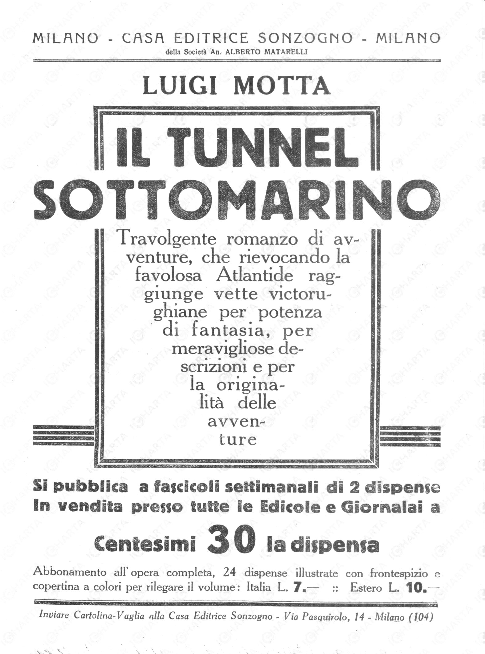 Volantino pubblicitario per il romanzo di Luigi Motta Il tunnel sottomarino, edizioni Sonzogno, 1927